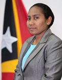 Nélia Soares Menezes, Abgeordnete des Nationalparlaments Osttimors